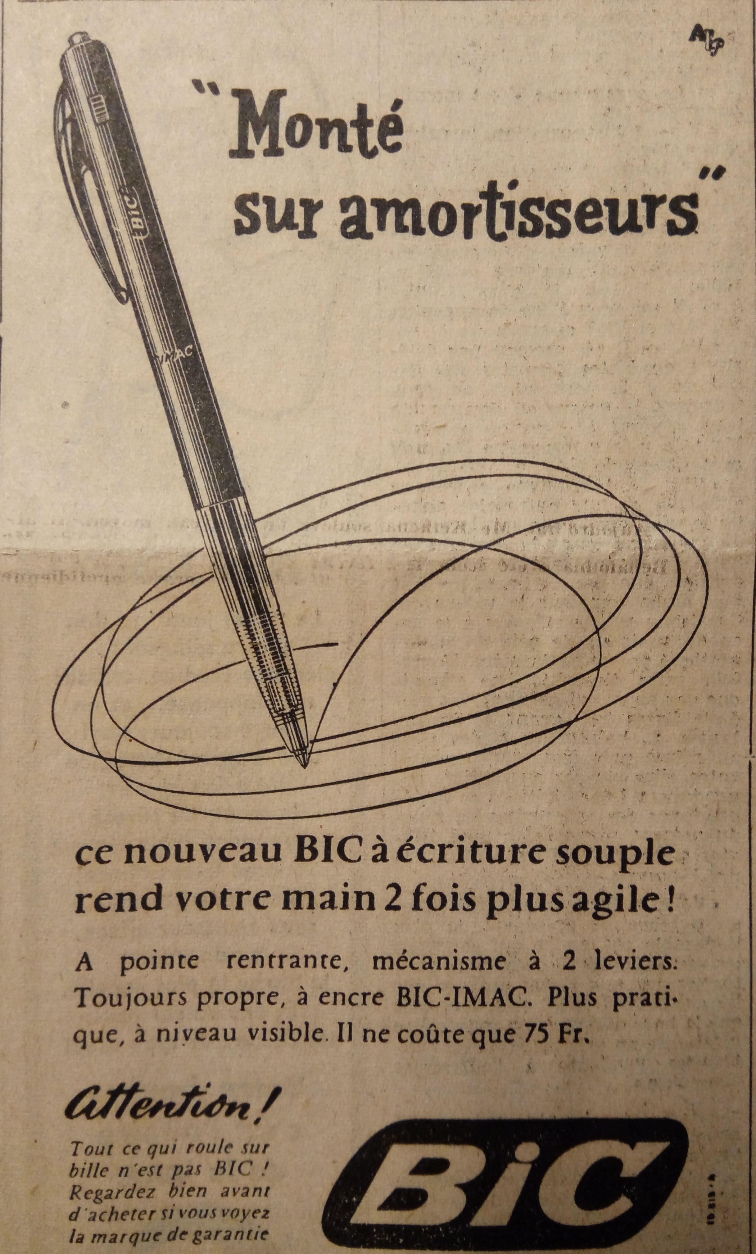 La presse Tunisie 1956